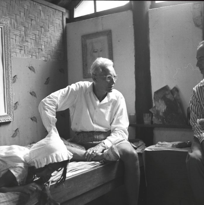 Rudolf Bonnet, dalam pembicaraan dengan seniman Spanyol Antonio Blanco di studio Theo Meier, Desa Iseh, Bali.